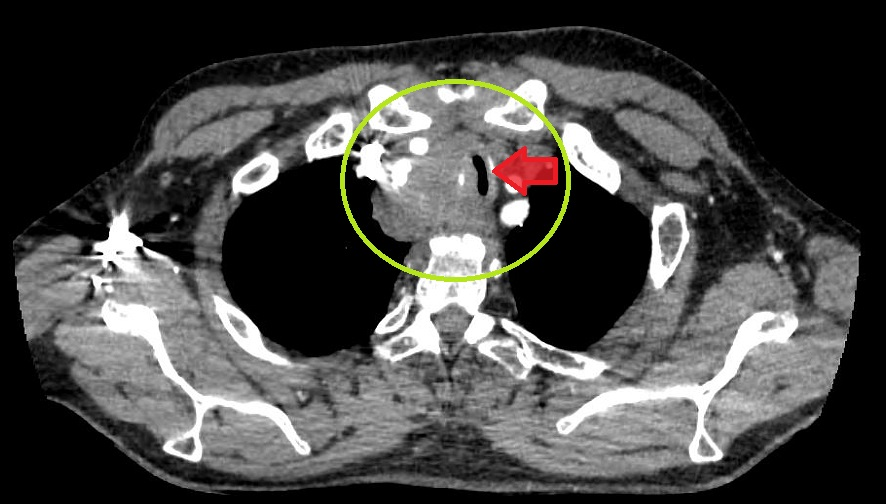 Tumeur maligne développée à partir de la trachée, entraînant une sténose.